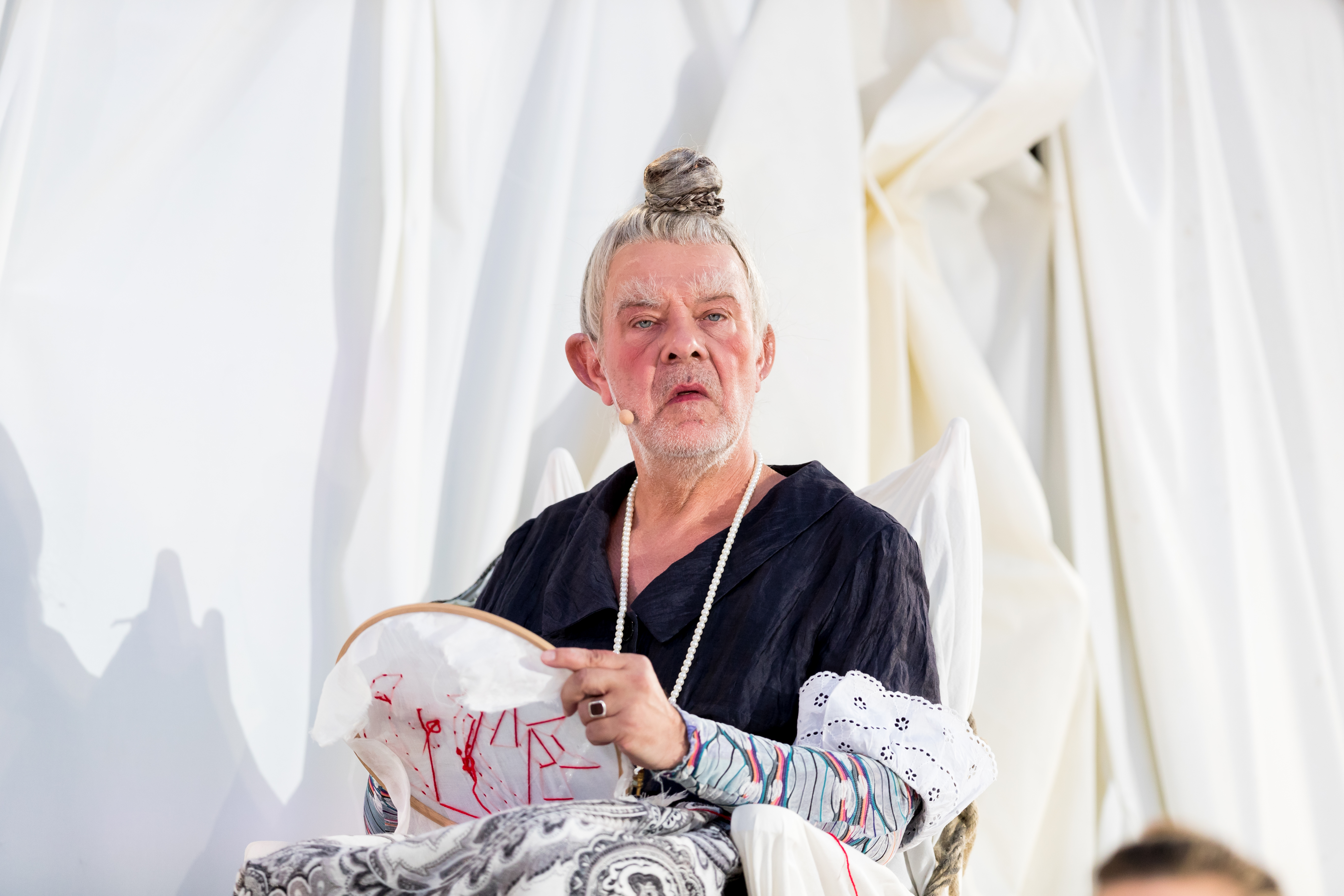 Andreas Leupold during Nibelungenfestspiele ( at Worms, Rheinland-Pfalz, Germany on 2019-07-10, Photo: Sven Mandel